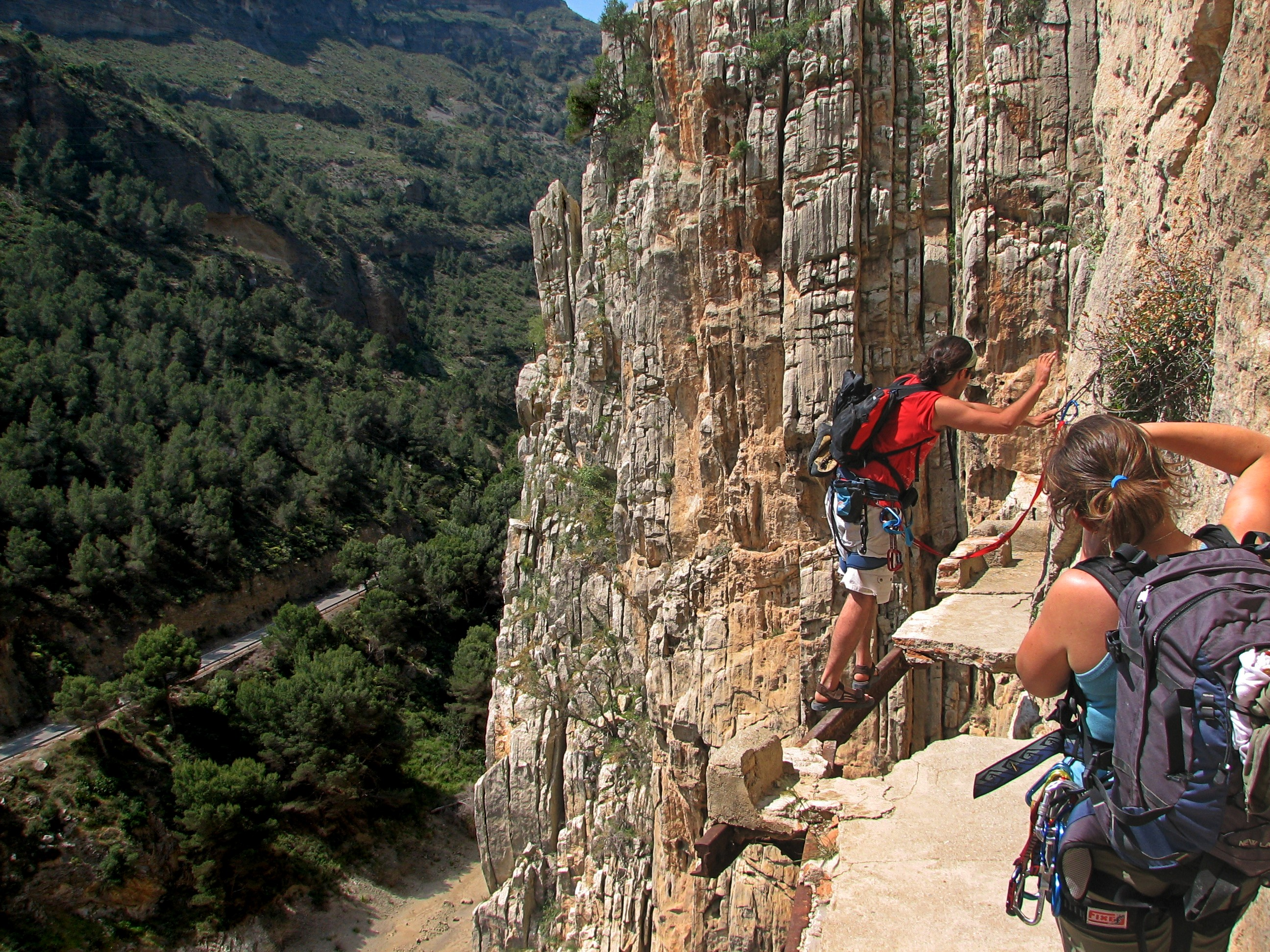 Caminito del Rey in El Chorro (Málaga, Spain)